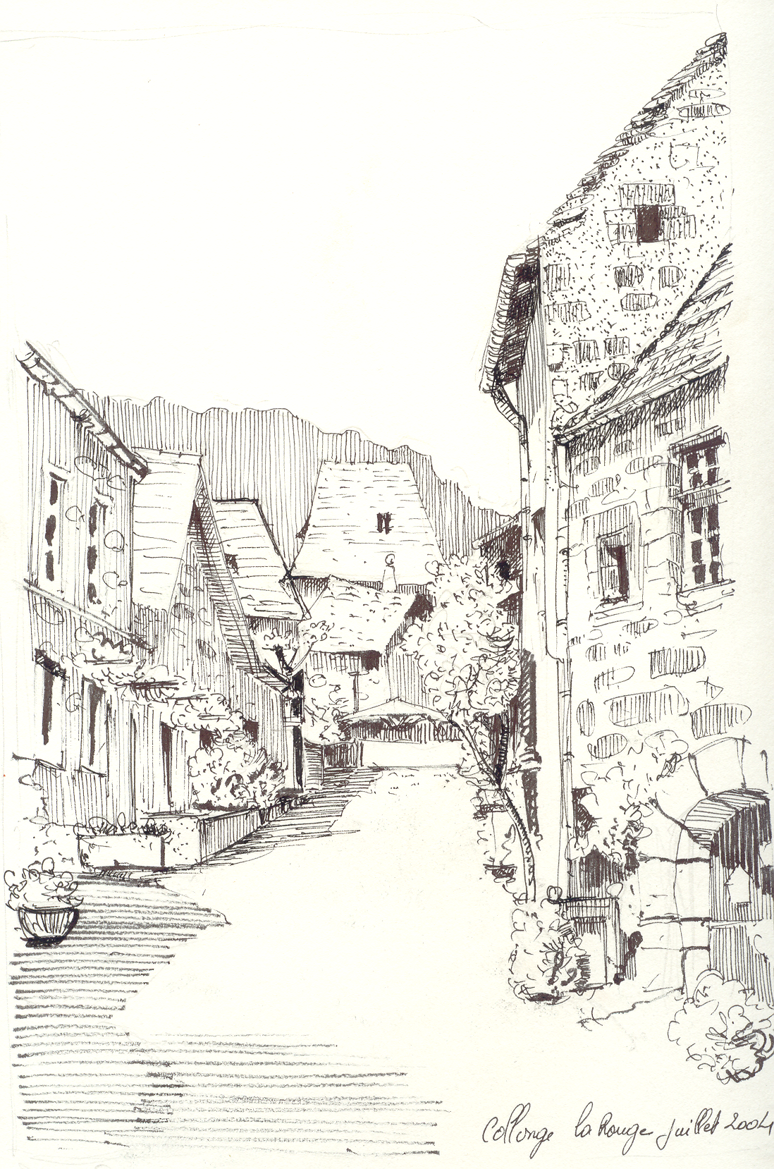 dessin a la plume de collonge la rouge dont je suis l'auteur--Michel mans 9 septembre 2006 à 11:47 (CEST)